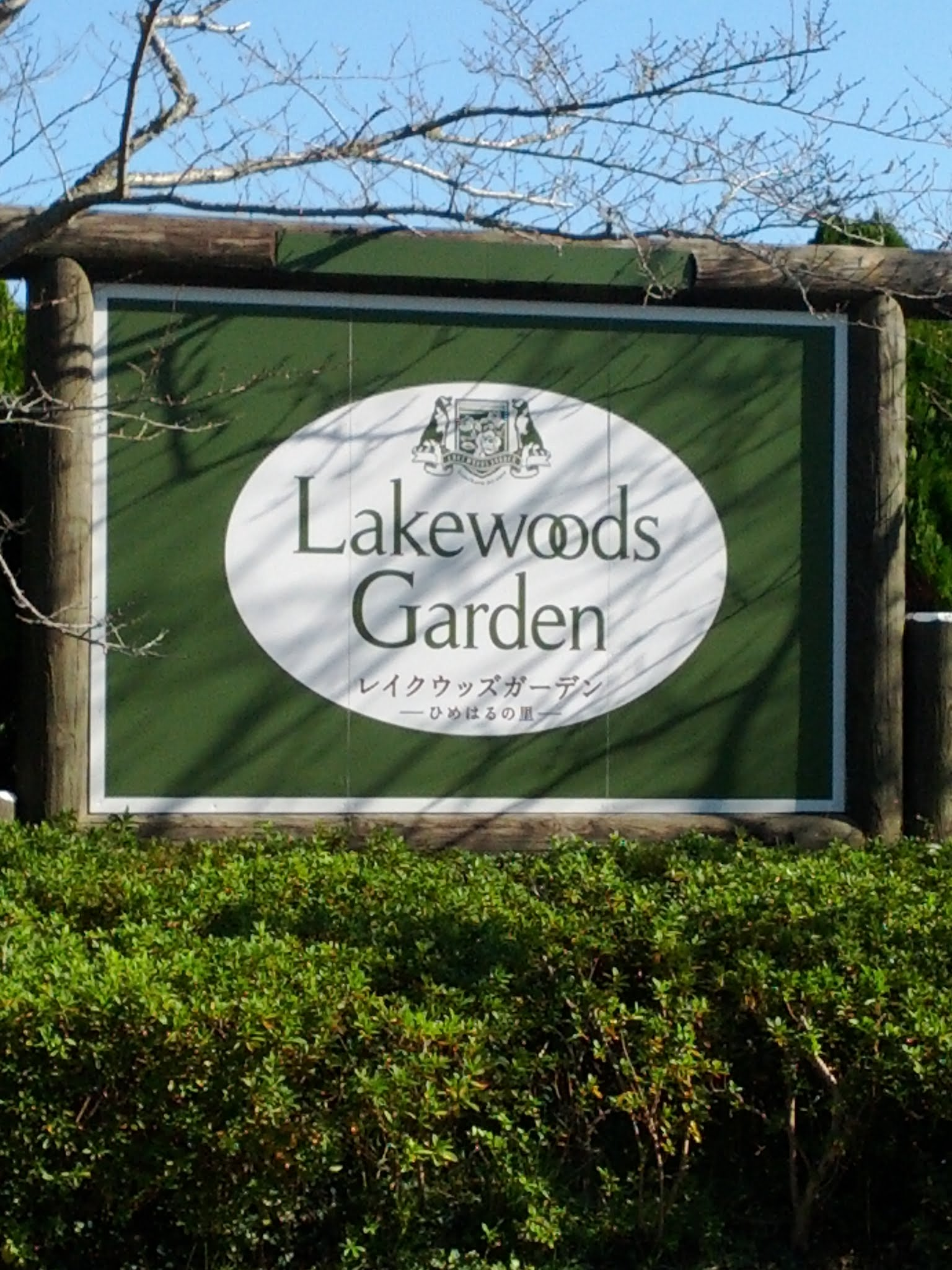 レイクウッズガーデン ひめはるの里